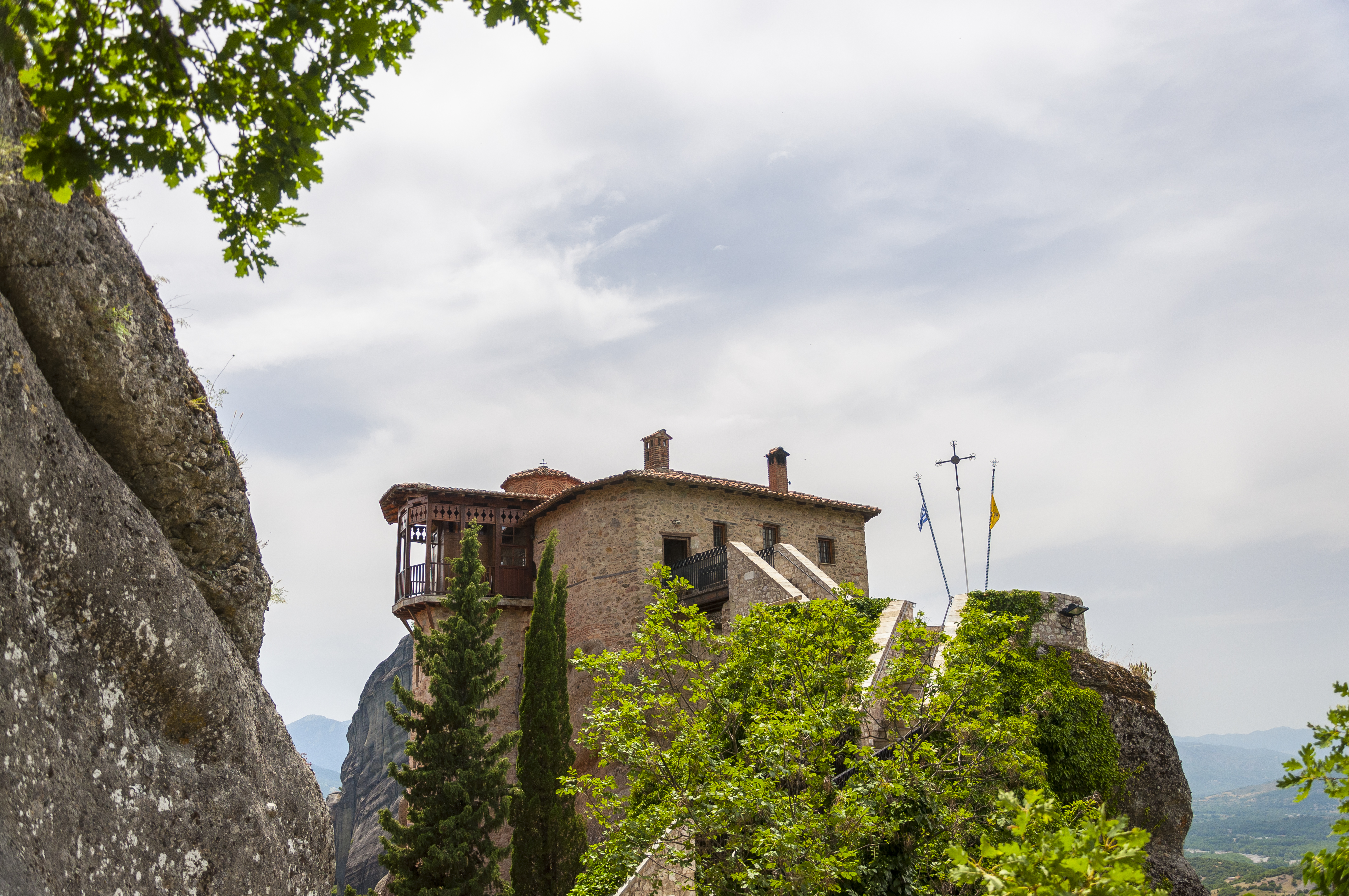 Μονή Ρουσάνου Μετεώρων«Μονή Ρουσάνου Μετεώρων»